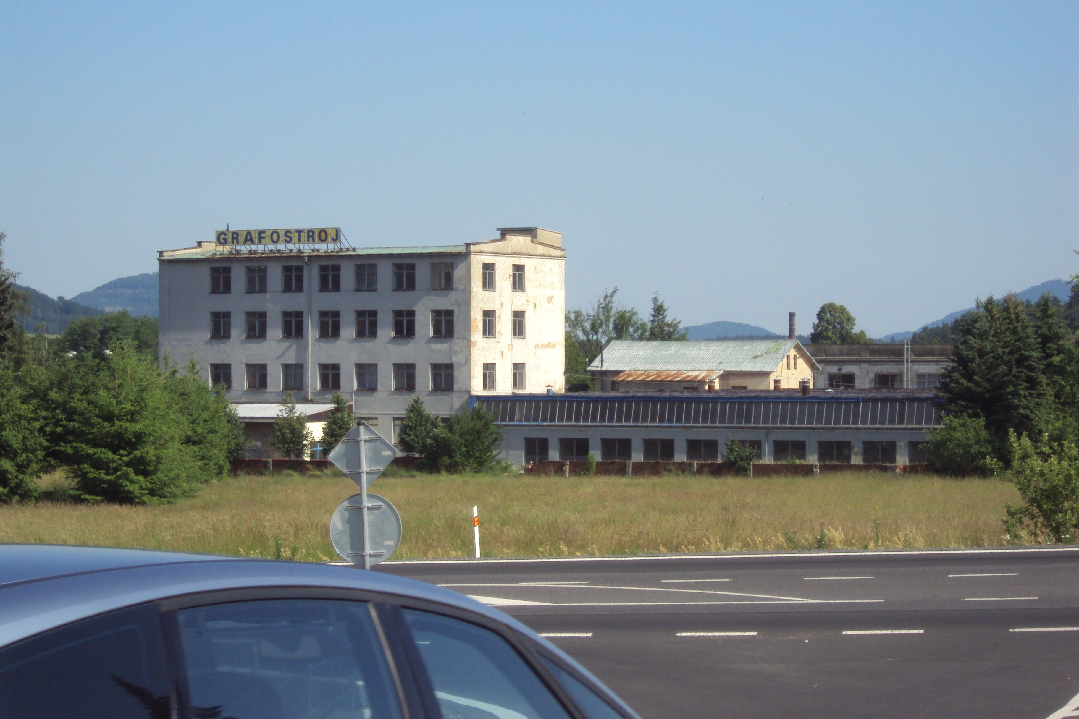 Továrna Grafostroj, sídlo v ulici Tovární 417, Cvikov II, foceno od autobusové zastávky na Pivovarské ulici